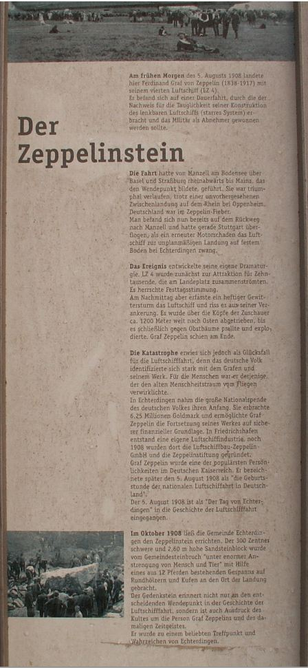 Infotafel der Stadt Leinfelden-Echterdingen am Zeppelinstein in Echterdingen